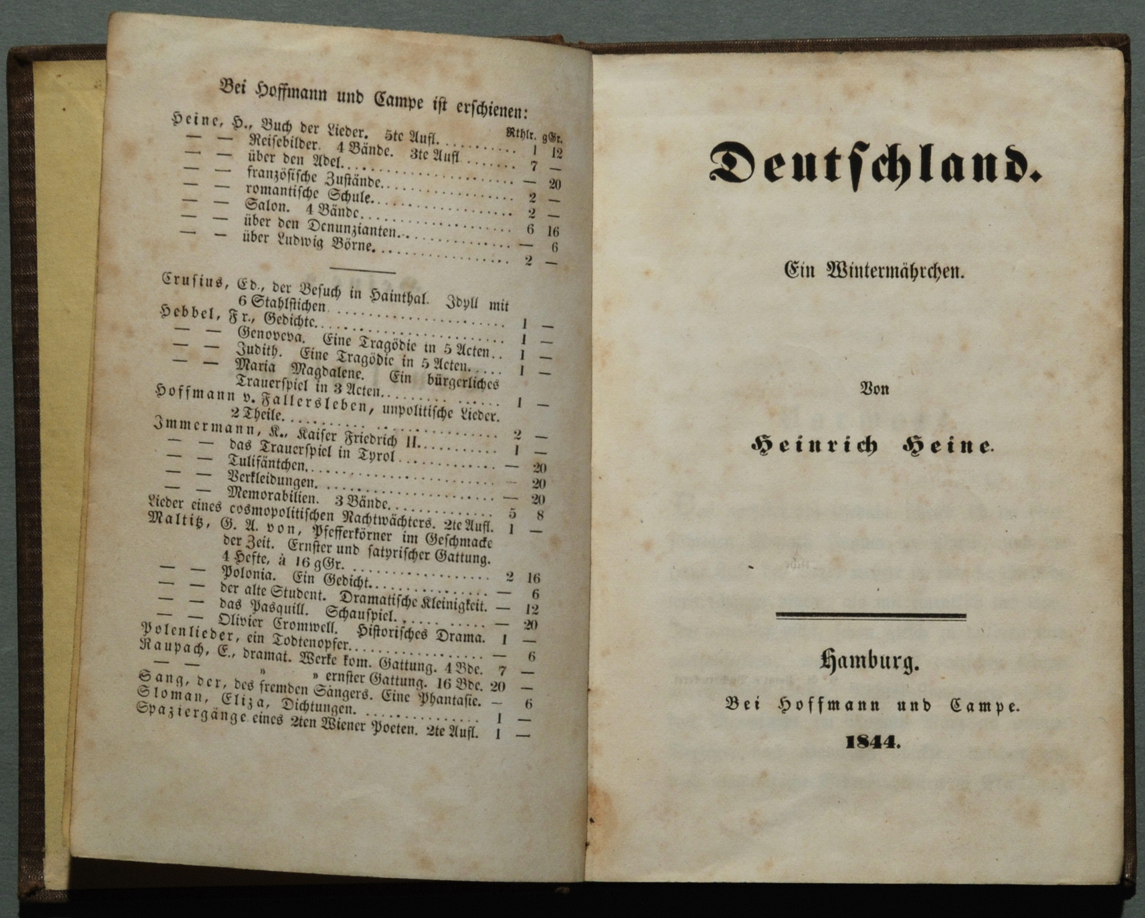 Heine, Heinrich: Deutschland. Ein Wintermährchen [Wintermärchen]. Hamburg: Hoffmann und Campe 1844, Vortitel + 1 Seite Verlagsanzeigen + Haupttitel + XII Seiten + 2. Titel (als Seite mitgezählt) + 143 Seiten. Erste Separatausgabe (Wilpert/Gühring²16)